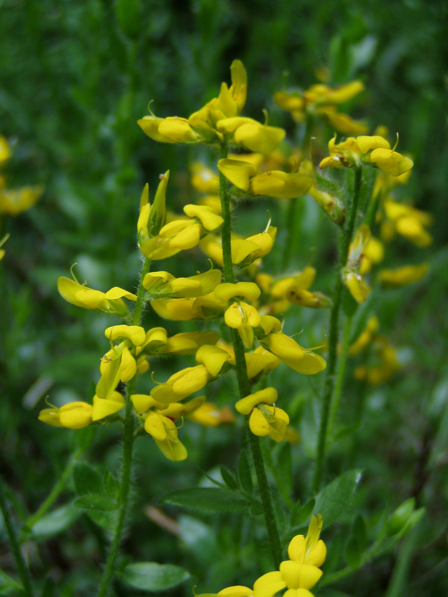 Deutscher Ginster (Genista germanica) in einem Wald im Lavanttal/Kärnten/ Genista germanica in a forest in Carinthia/Austria